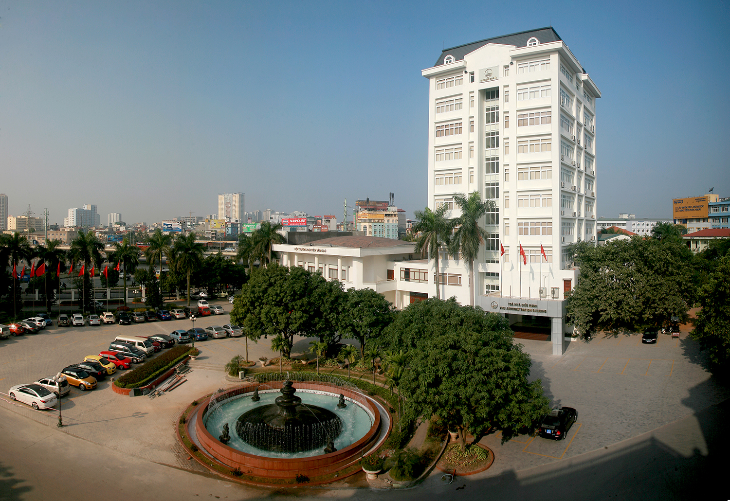 Nhà điều hành Đại học Quốc gia Hà Nội, 144 đường Xuân Thuỷ, quận Cầu Giấy, Hà Nội, Việt Nam